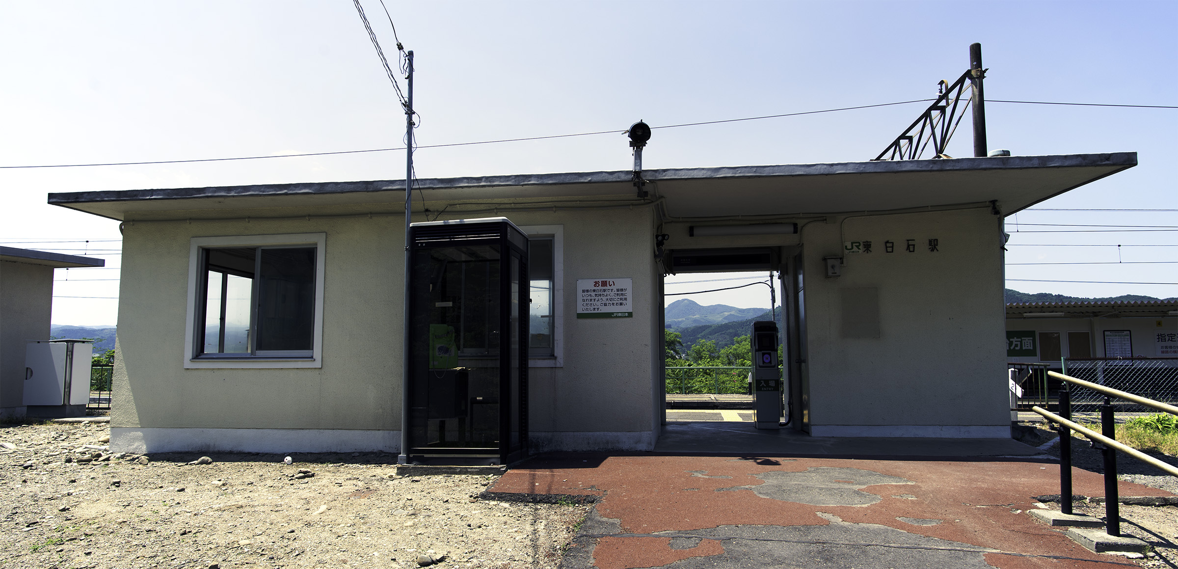 東日本旅客鉄道株式会社東北本線東白石駅駅舎